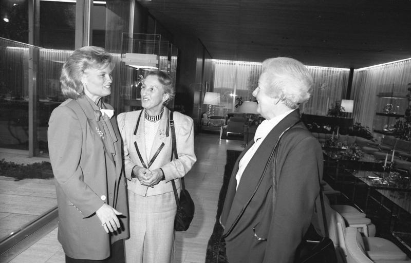 21.4.1988 Hannelore Kohl gibt ein Abendessen für weibliche Mitglieder der Bundestagsfraktionen der CDU/CSU und FDP im Kanzlerbungalow